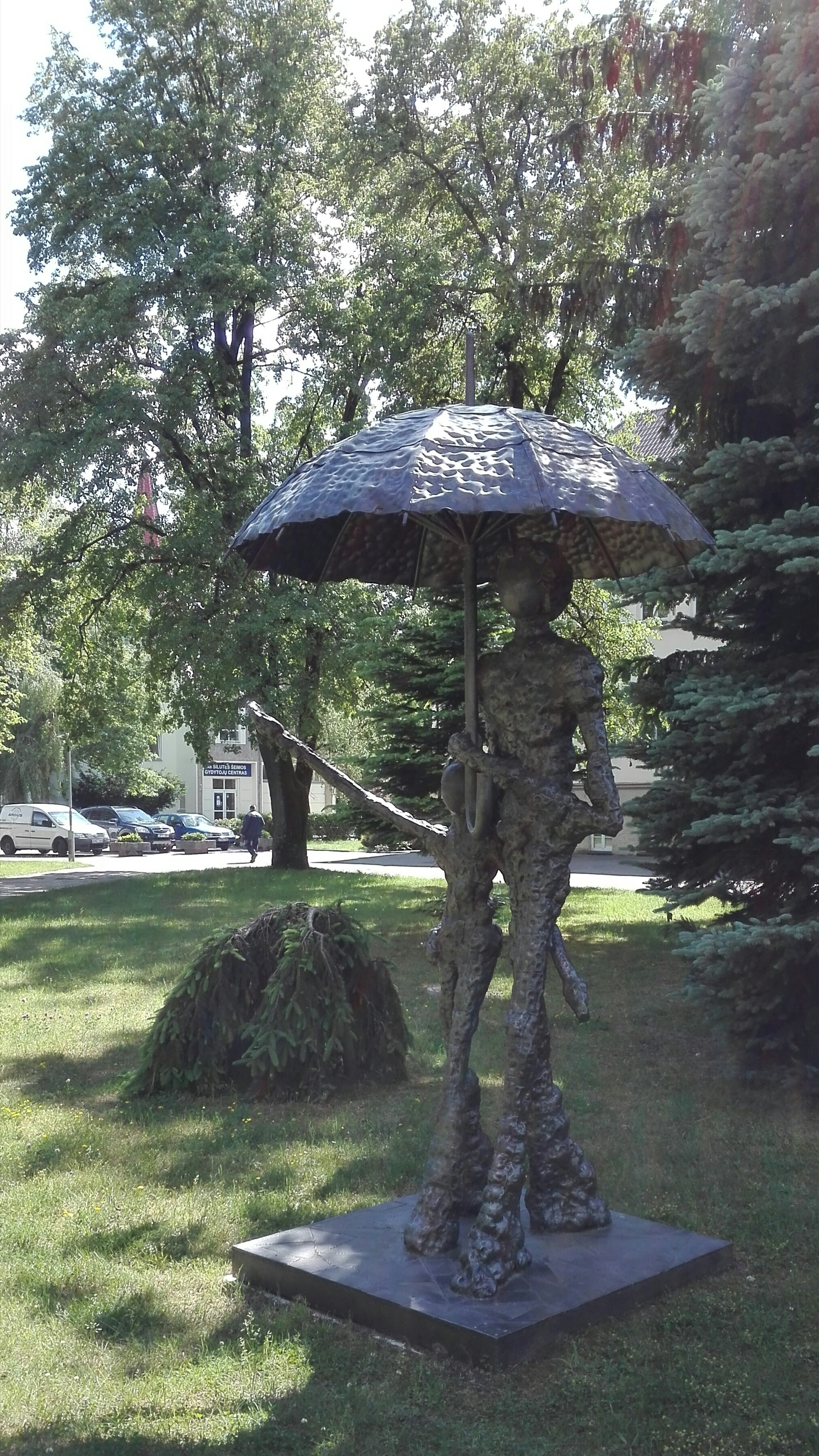 Skulptūra prie Šilutės pirmosios gimnazijos